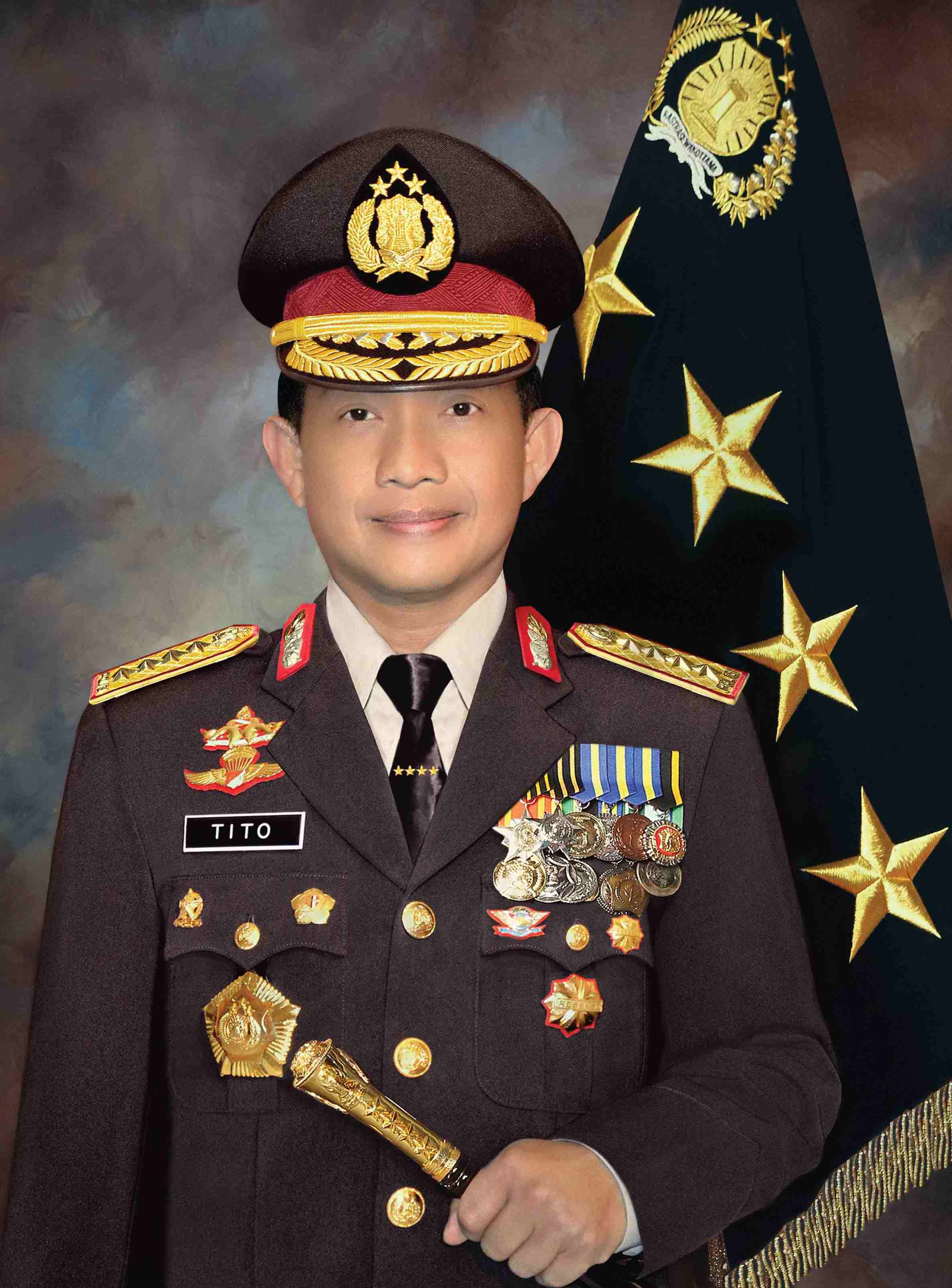 Jenderal Polisi Tito Karnavian sebagai Kapolri. Diambil dari akun Instagram resmi Divisi Humas Mabes Polri @humas_polri